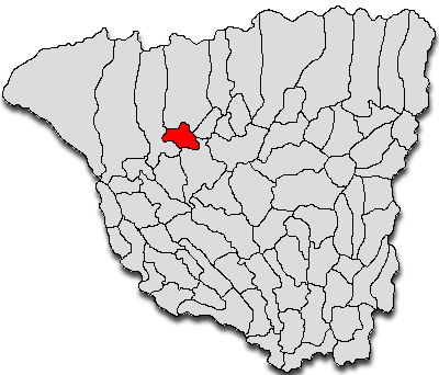 Categorie:Hărţi ale judeţului Gorj